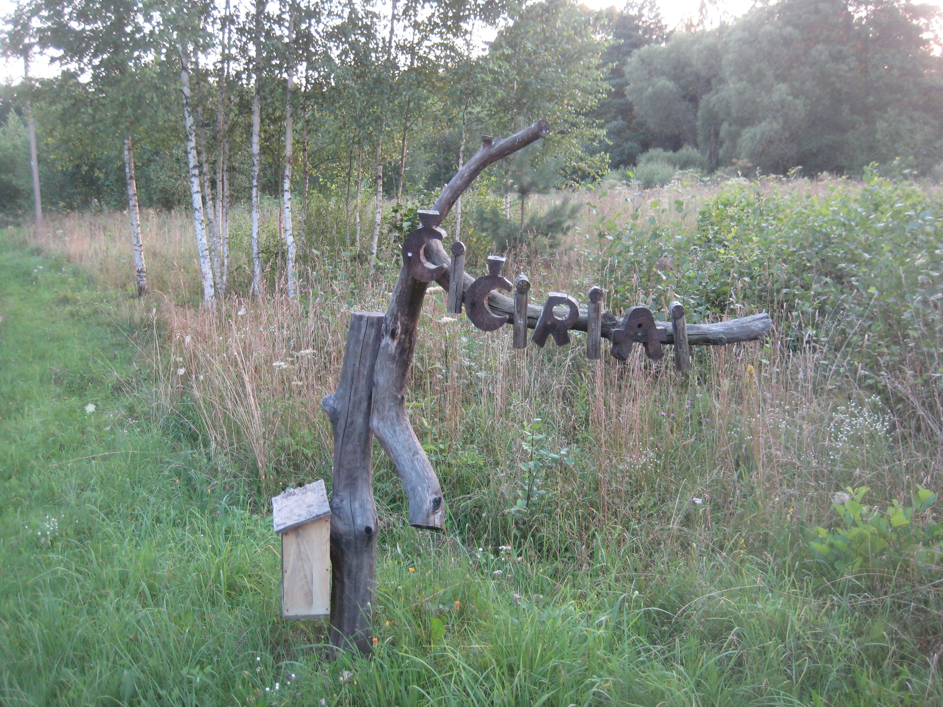 Antazavės sen., Lithuania